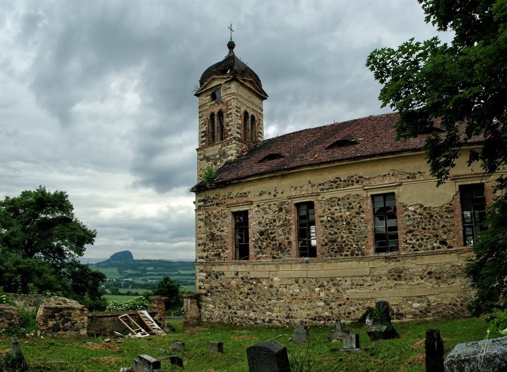 Kostel sv. Jakuba Většího, Mrzlice